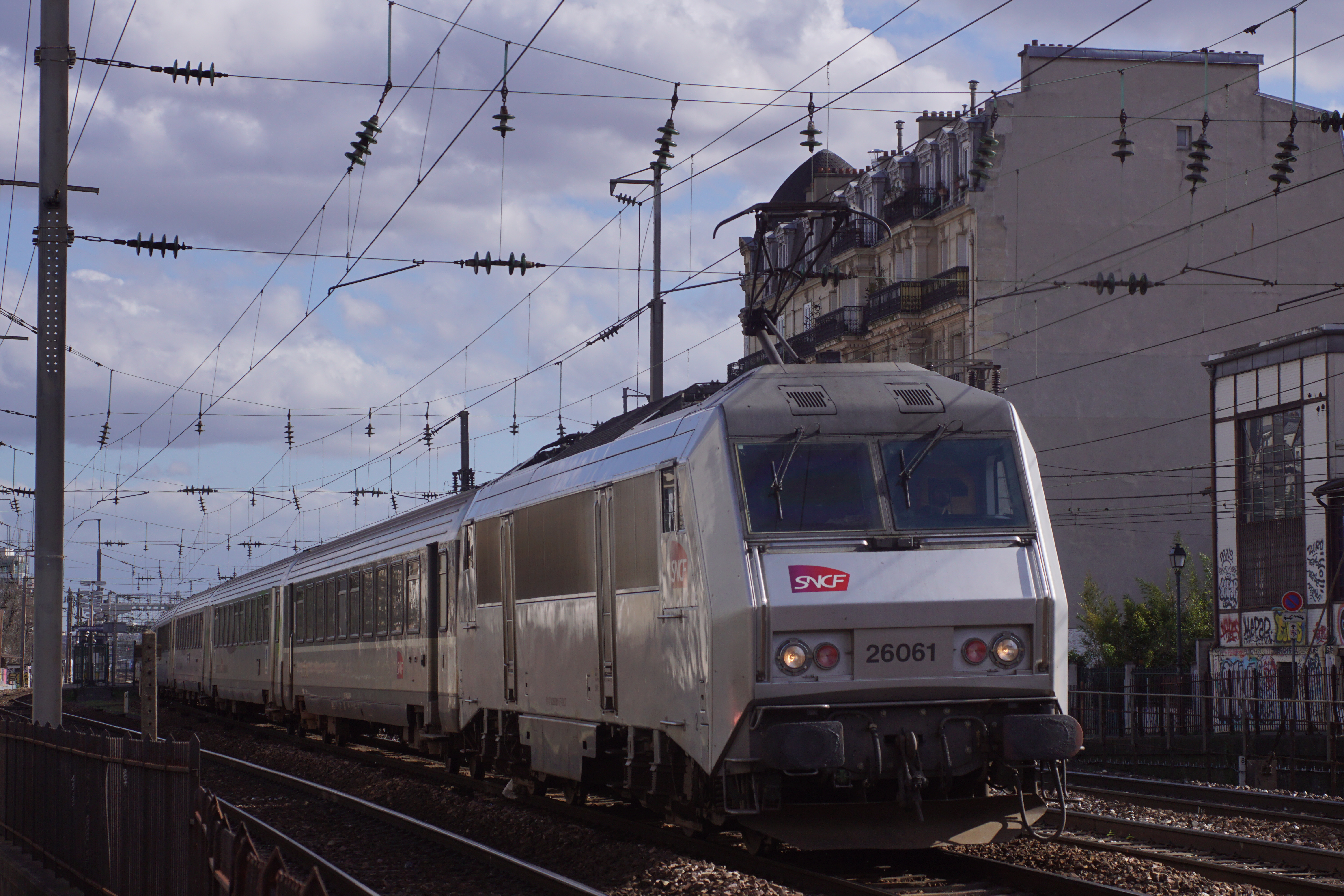 Une BB 26000 en livrée fantôme avec des voitures Corail vers une destination bas-normande au vu de sa composition.